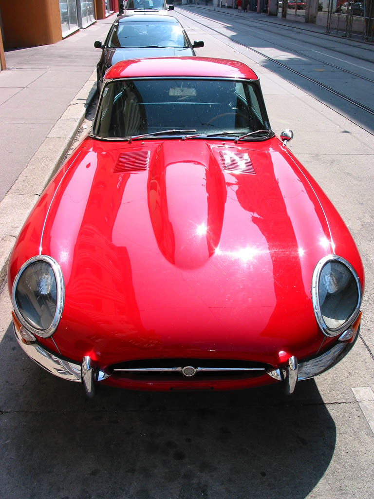 Jaguar E Typ